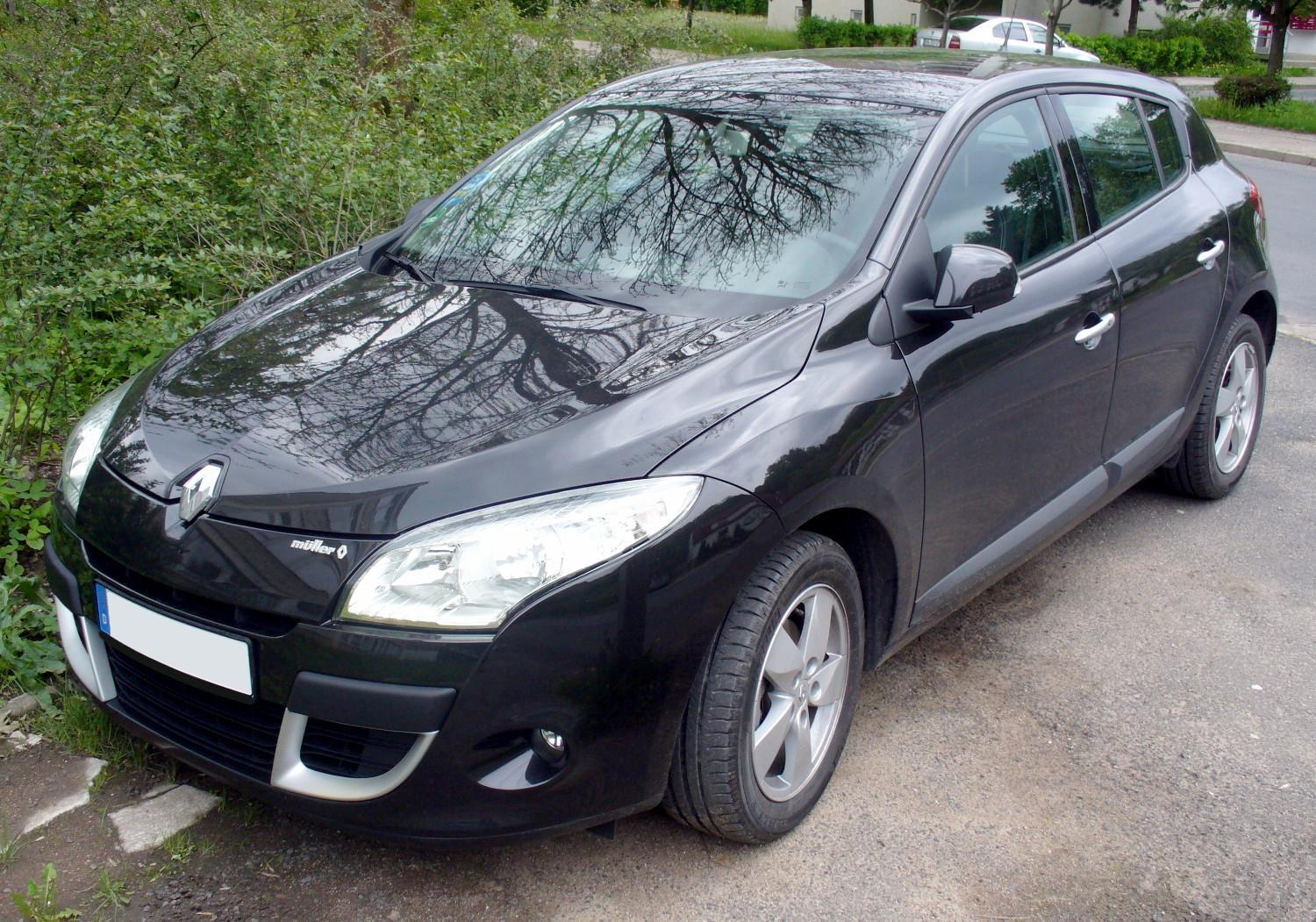 Renault Mégane III